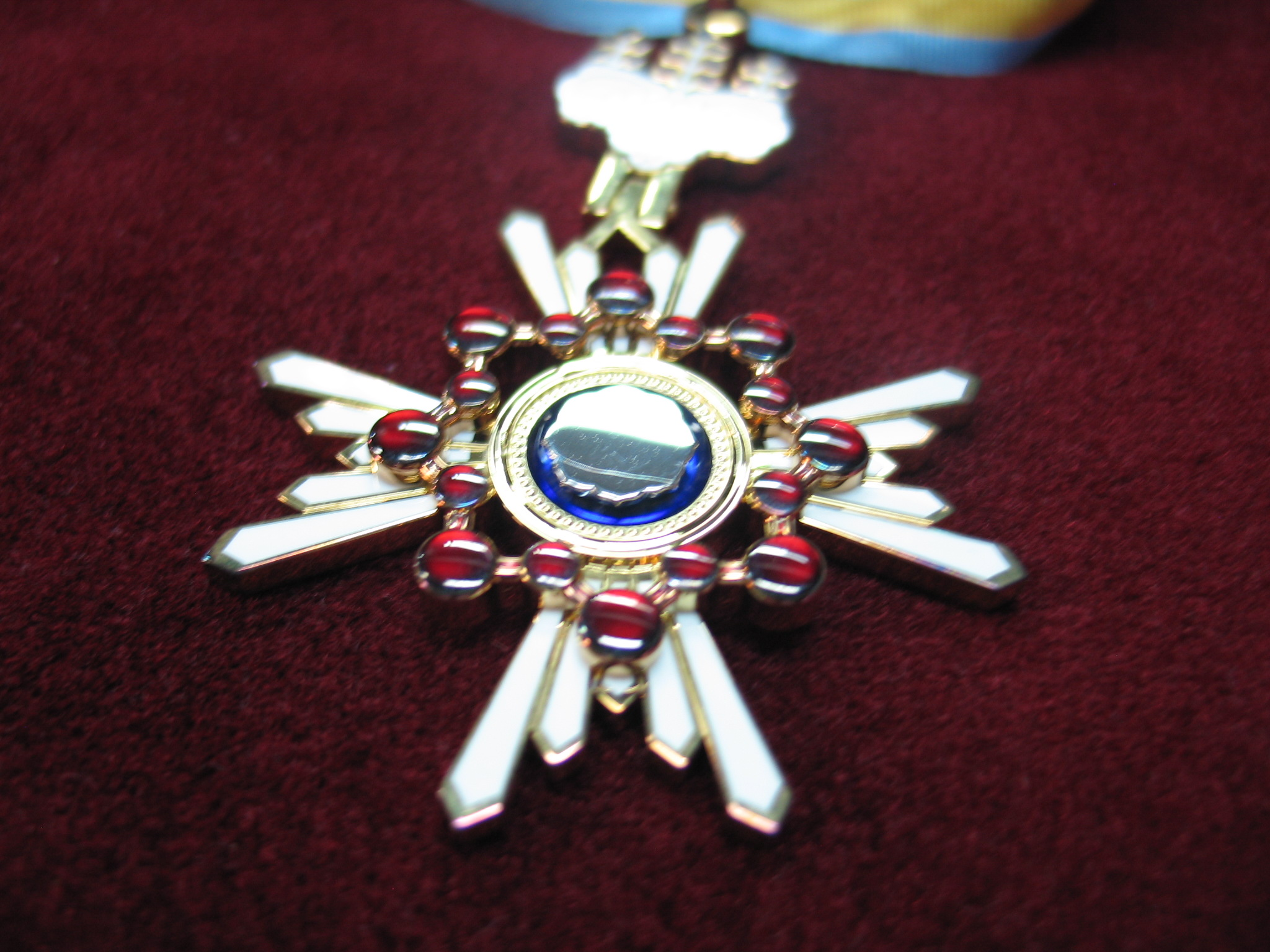 Medalla concedida a Yu Takeuchi por el Imperio Japones, por sus contribuciones culturales en Colombia.